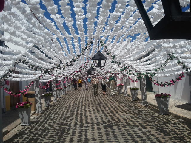 Festas do Povo 2011